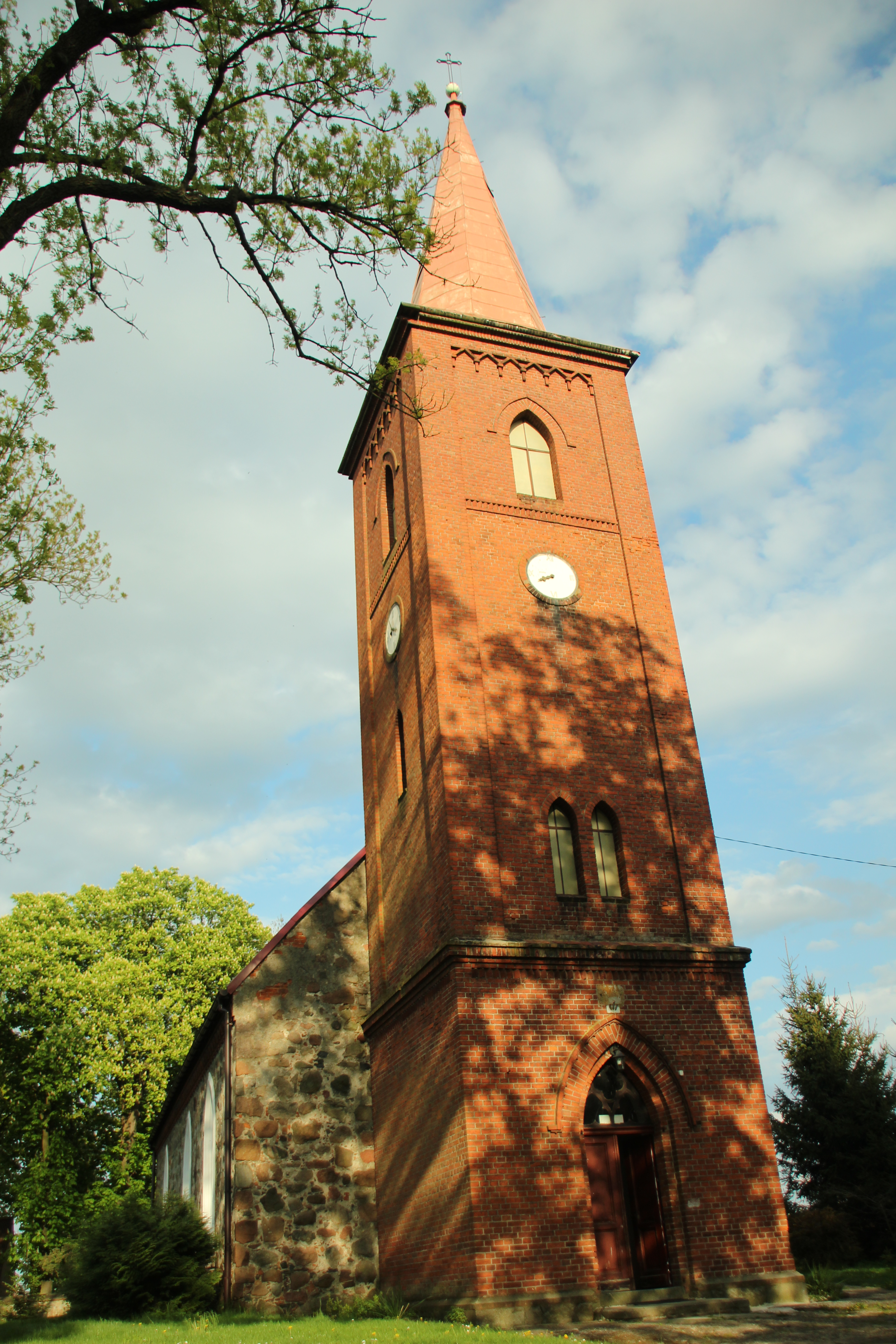 Mielno Pyrzyckie - rzymskokatolicki kościół filialny p.w. św. Stanisława Kostki